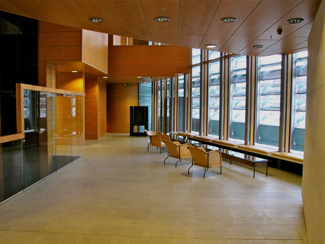 Sveriges ambassad i Berlin, foajén